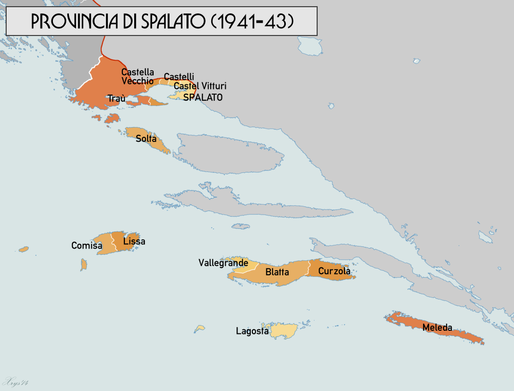 Mappa della Provincia Italiana di Spalato (1941-43). Dati di origine: Volkstumskarte von Jugoslawien, Wilfried Krallert (1941)